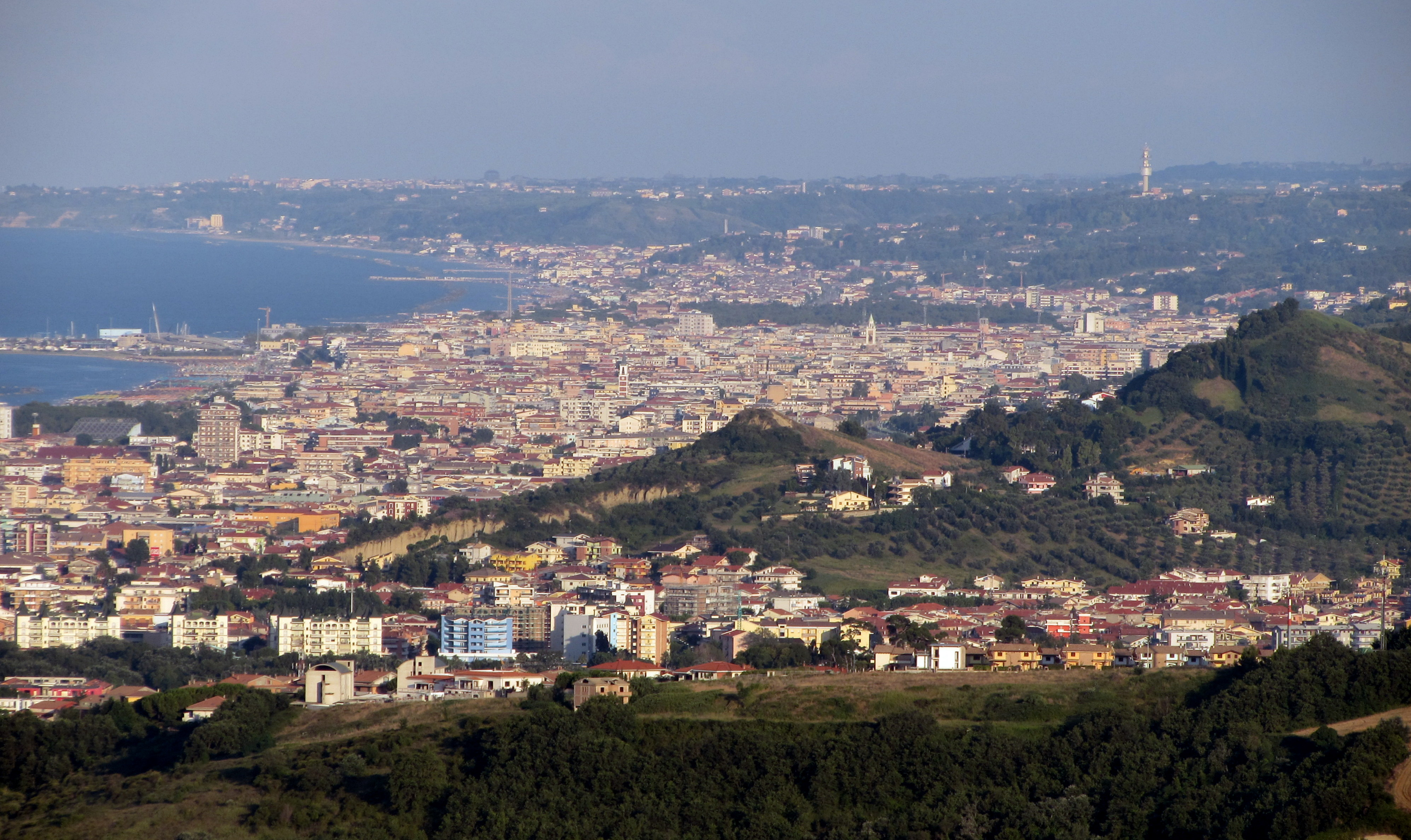 Veduta di Pescara da Pianacce (Silvi)